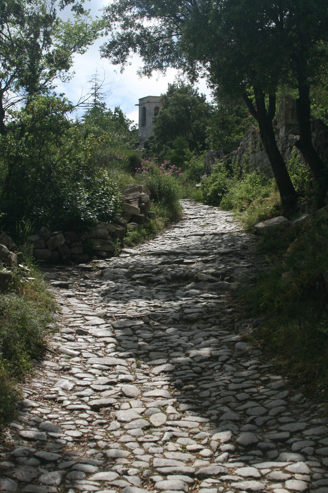 Oppède le Vieux - Callade montant à la collégiale Notre-Dame d'Alidon